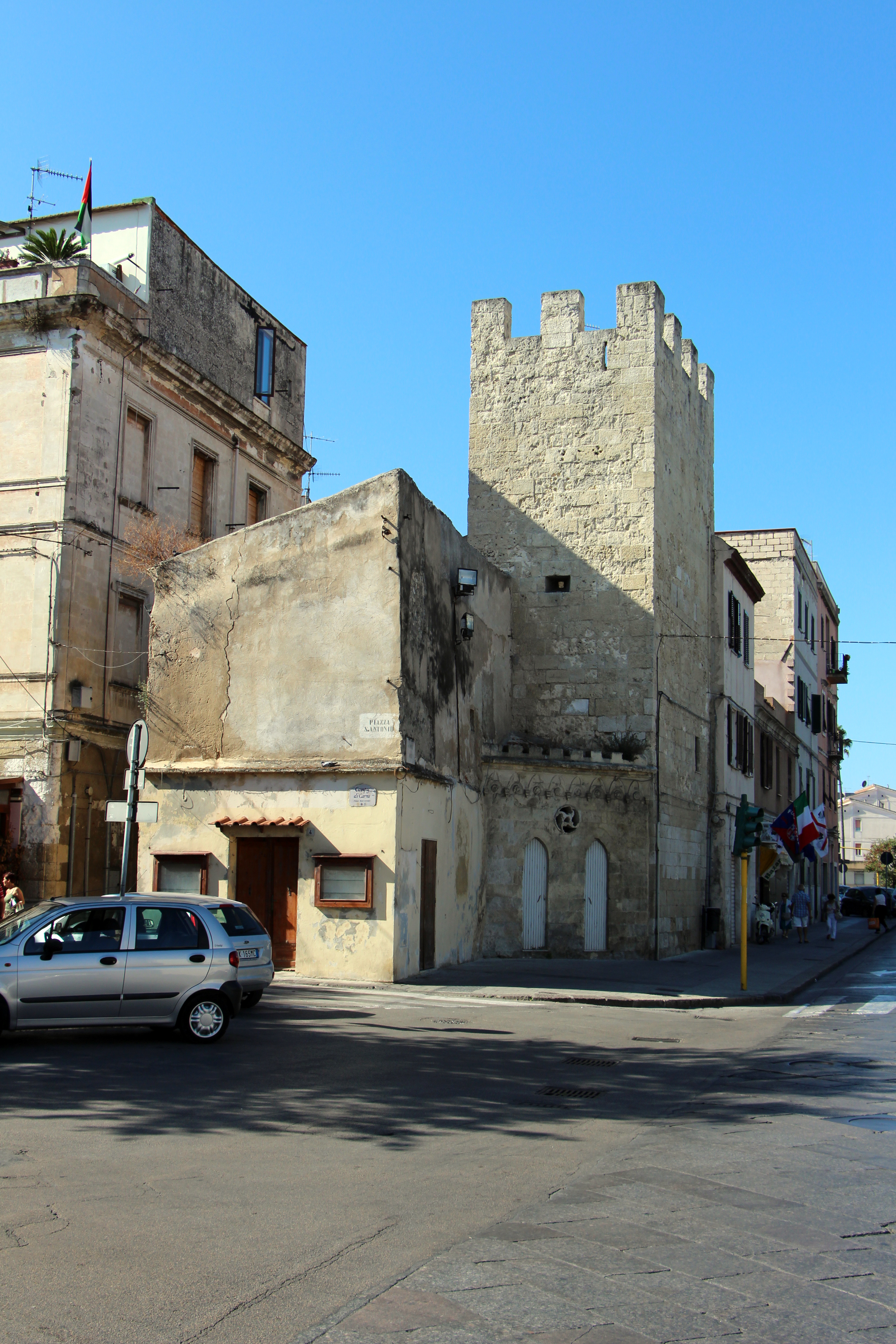 Sassari